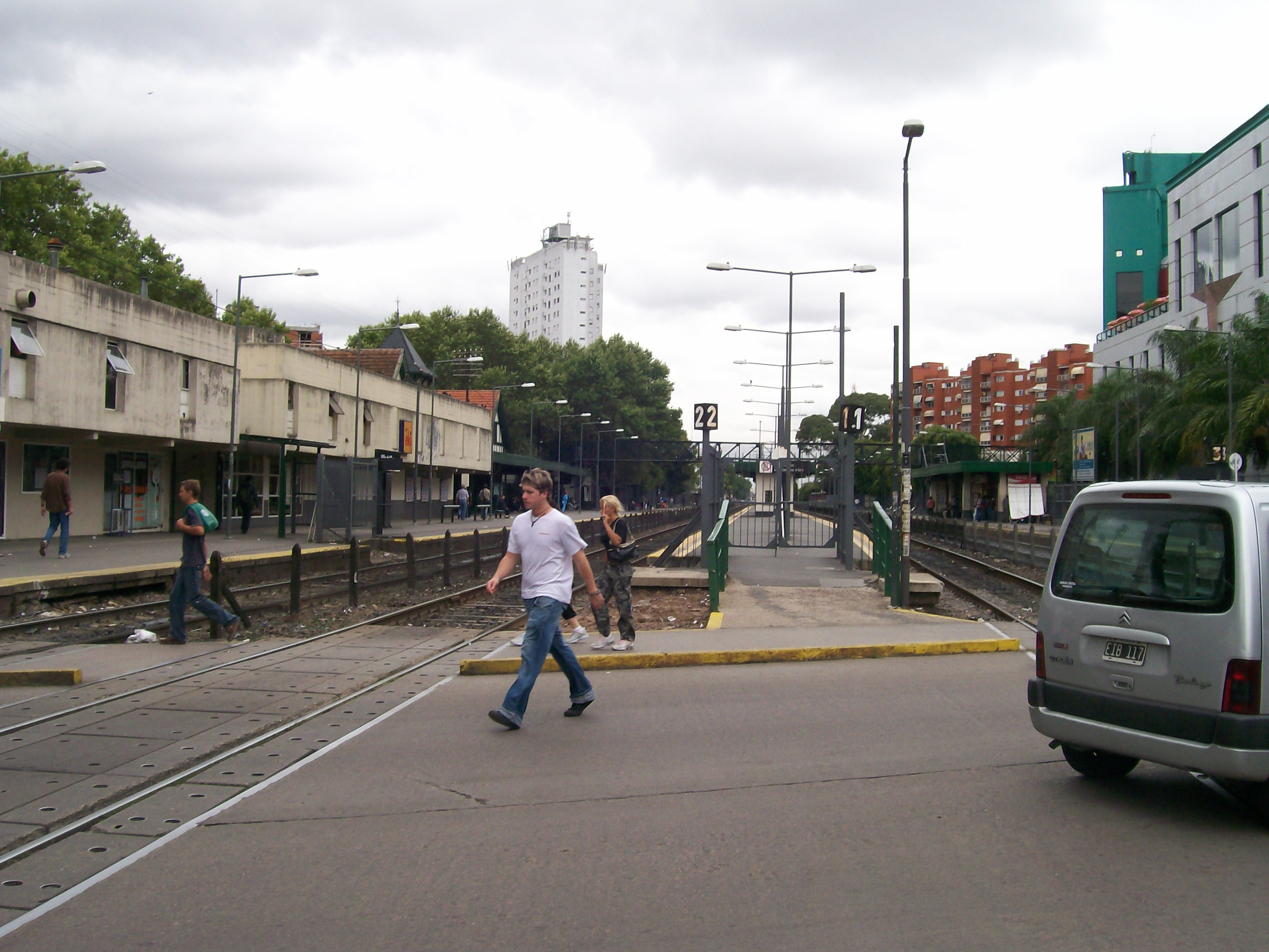 Estación Villa del Parque del Ferrocarril General San Martín en la Ciudad de Buenos Aires, Argentina.